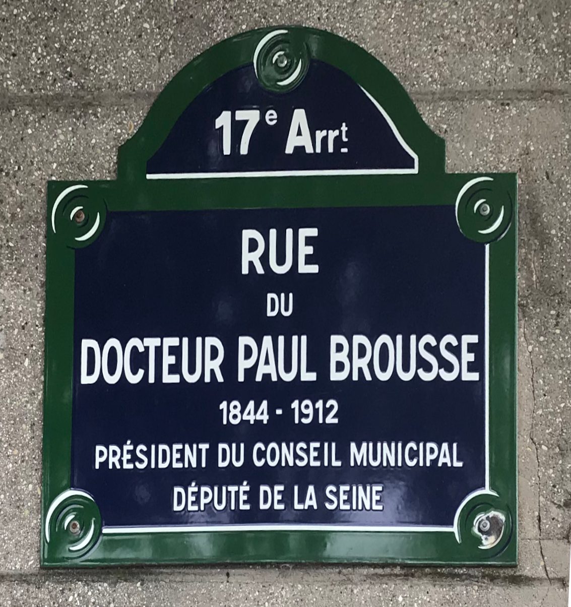 Image de Paris, septembre 2018.